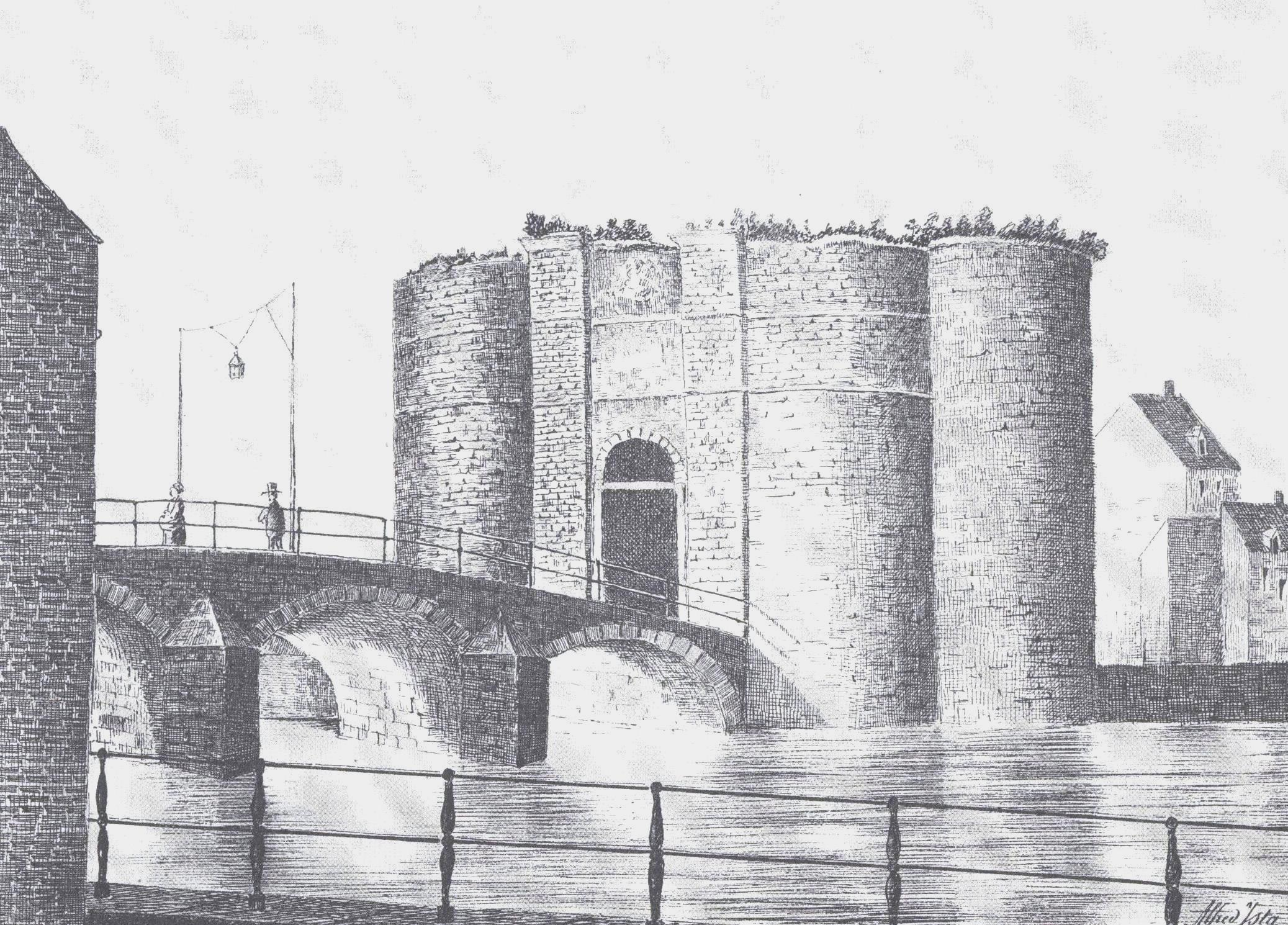 Porte d'Amercoeur